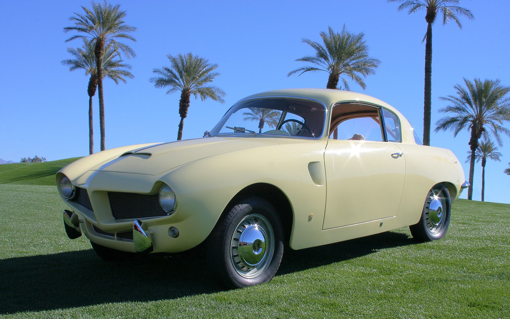 2011 Desert Classic, La Quinta, CA